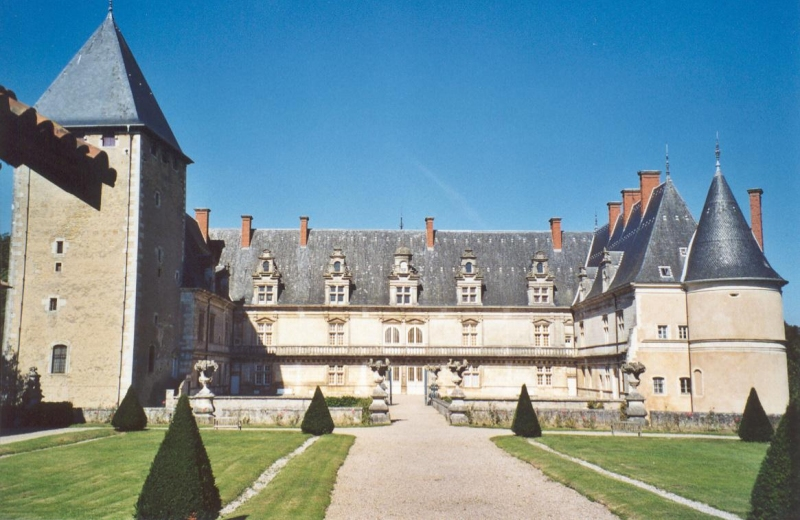 Château de Fléville, Fléville-devant-Nancy, Lorraine, France. édifice de style Renaissance agrémenté d'élégants jardins